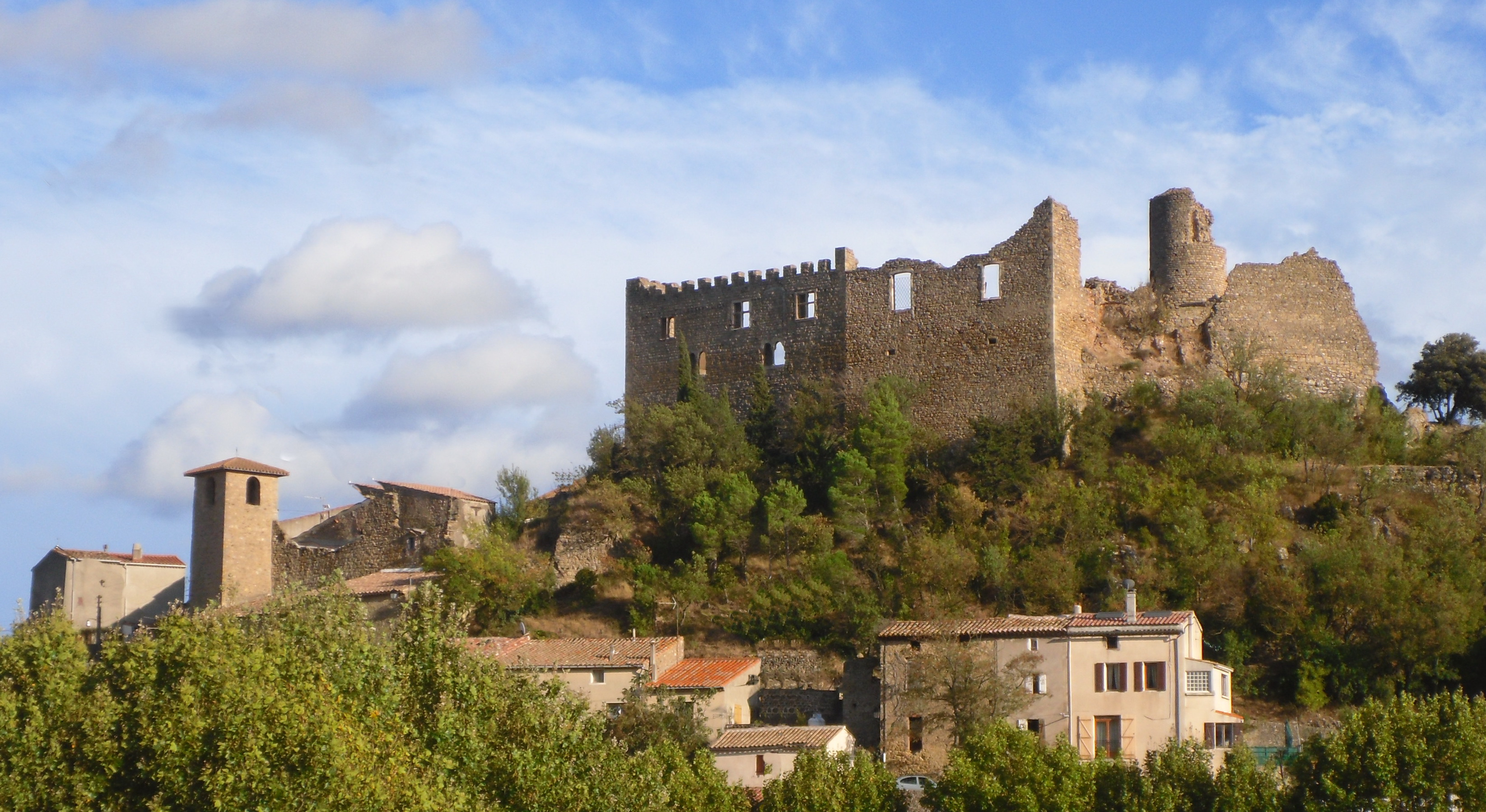 Chateau de Durban-Corbières (Aude)